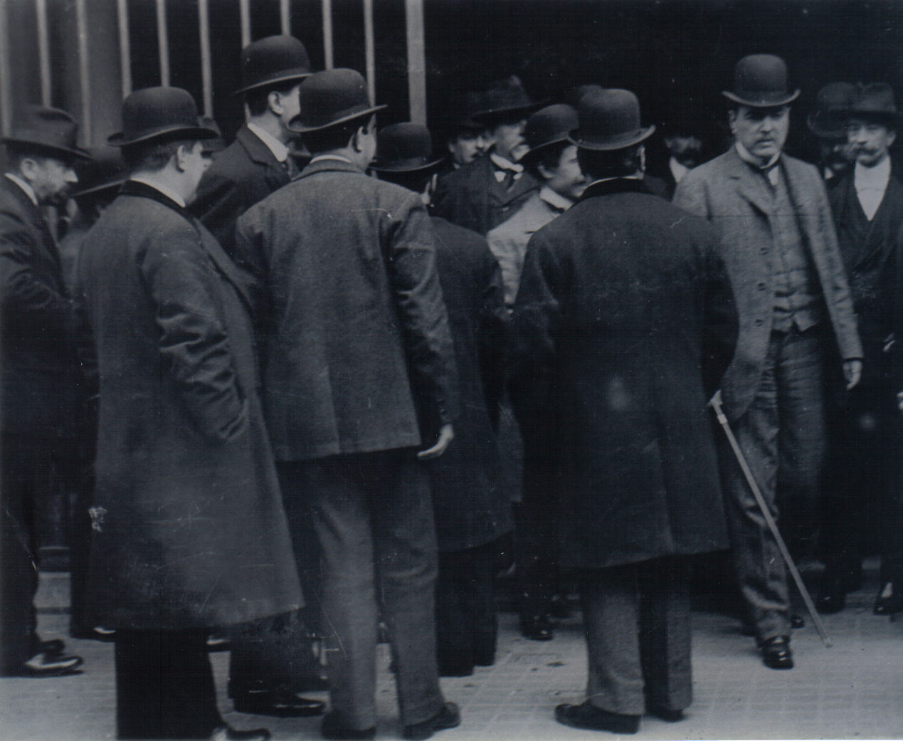 Una de las primeras fotografías tomadas a Hipólito Yrigoyen en público. Saliendo de una Convención de la UCR en el Salón Príncipe Jorge de la Capital, en 1909.